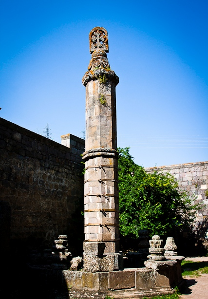 Տաթևի Ճոճվող սյունը 97/9.30